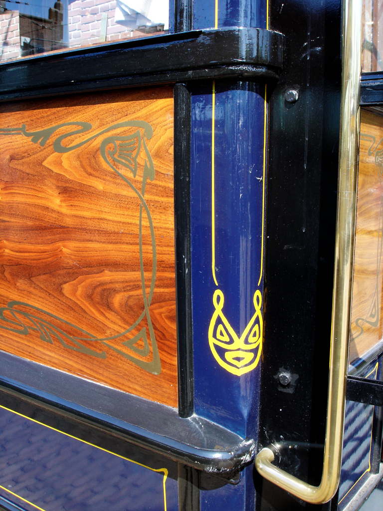 Jugendstil op tram